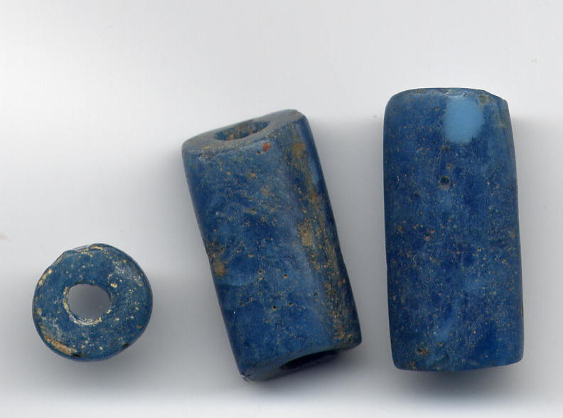 Yoruba, Keta awuazi beads.